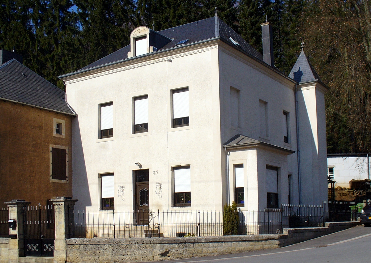 Haus No 55